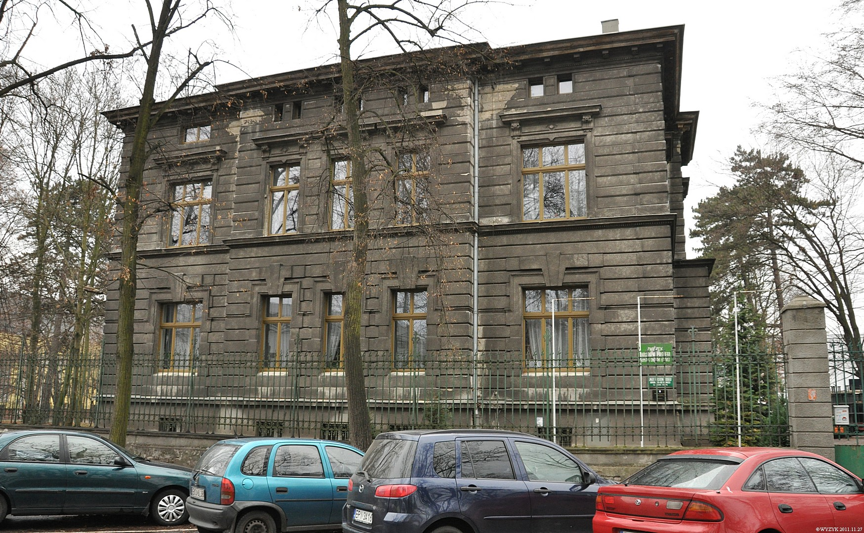 Willa Zygmunta Richtera Stefanowskiego 19 Łódź